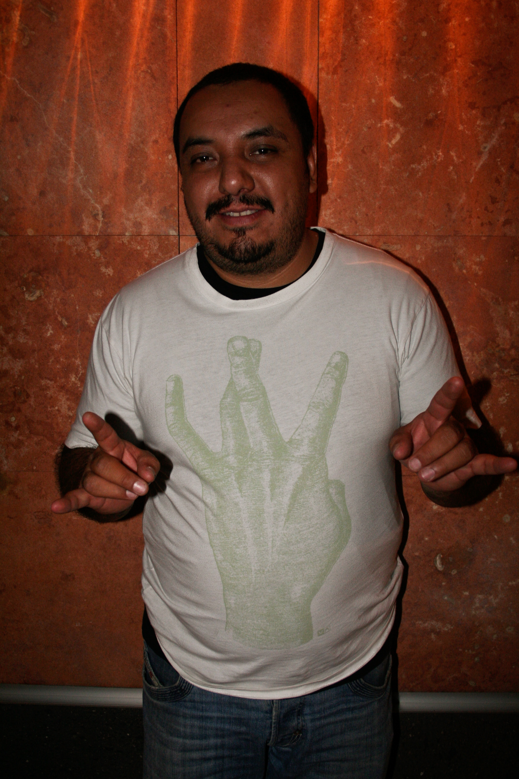 Paco Ayala. Photo by Karh Villavicencio